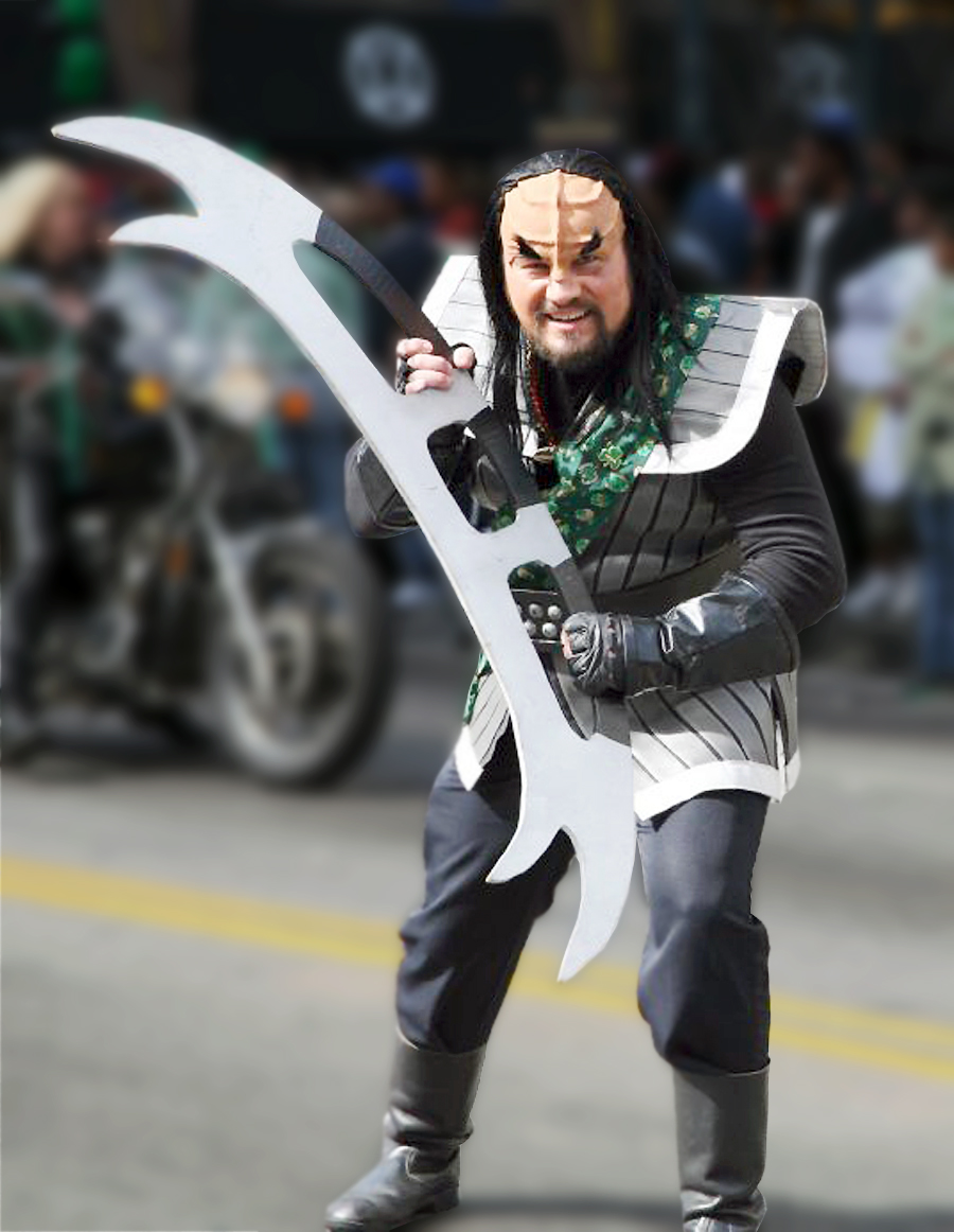 star trek klingon trekkie armed with Bat'leth